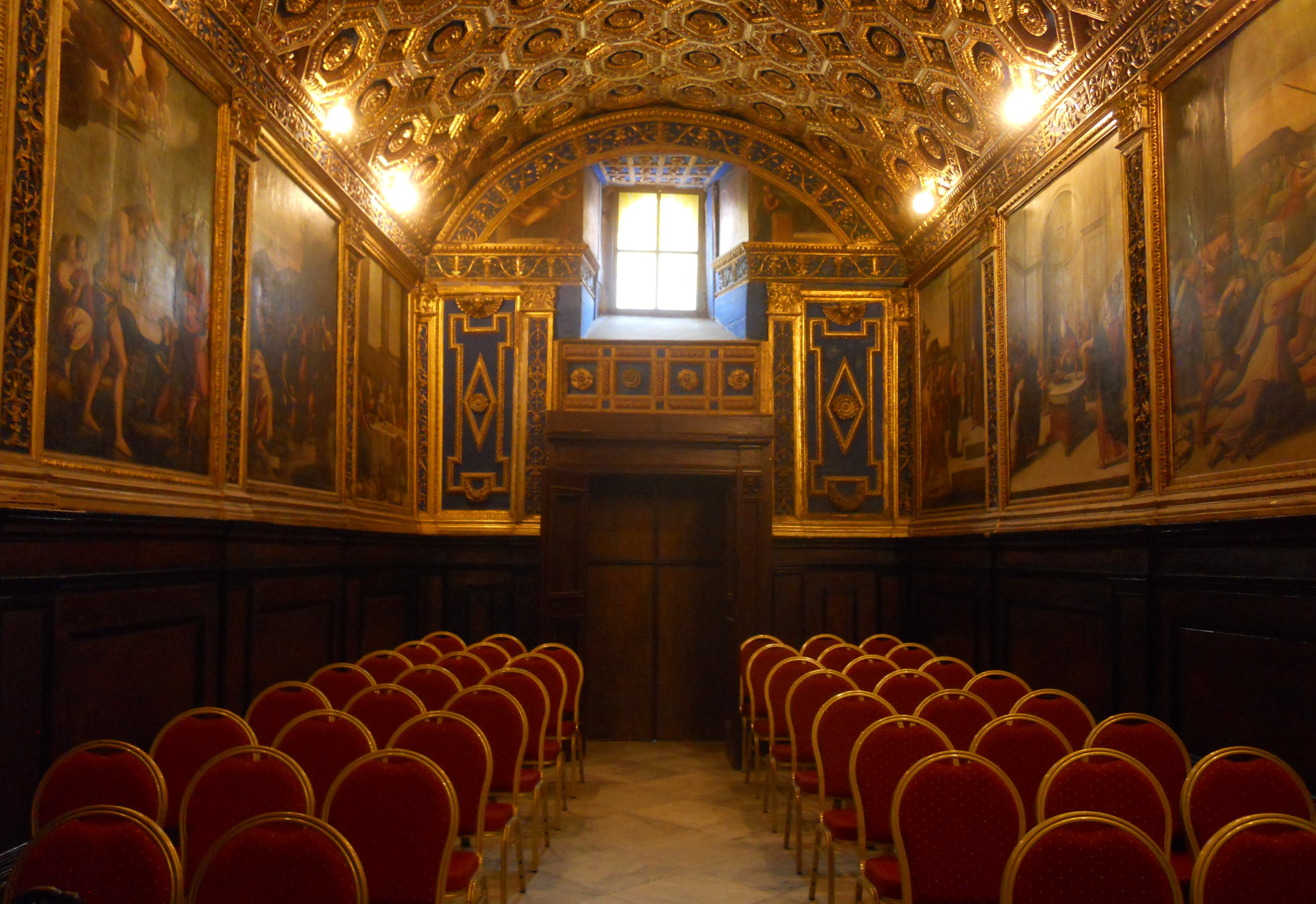 Interno verso la controfacciata della cappella d'Oro a Gaeta.